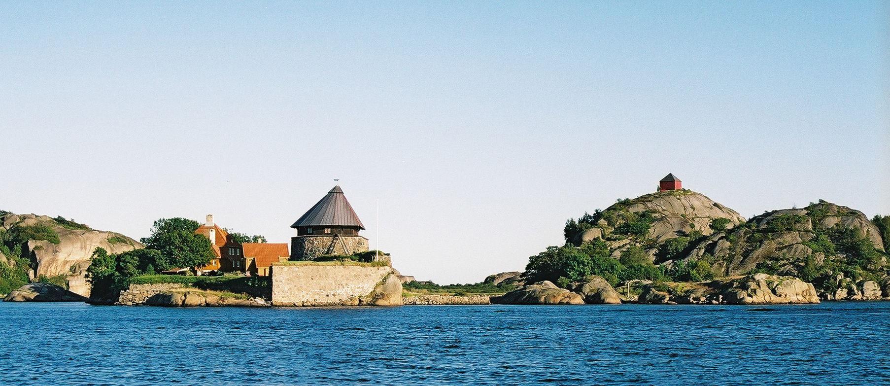 Staverns fort på Citadelløya med kruttårnet.